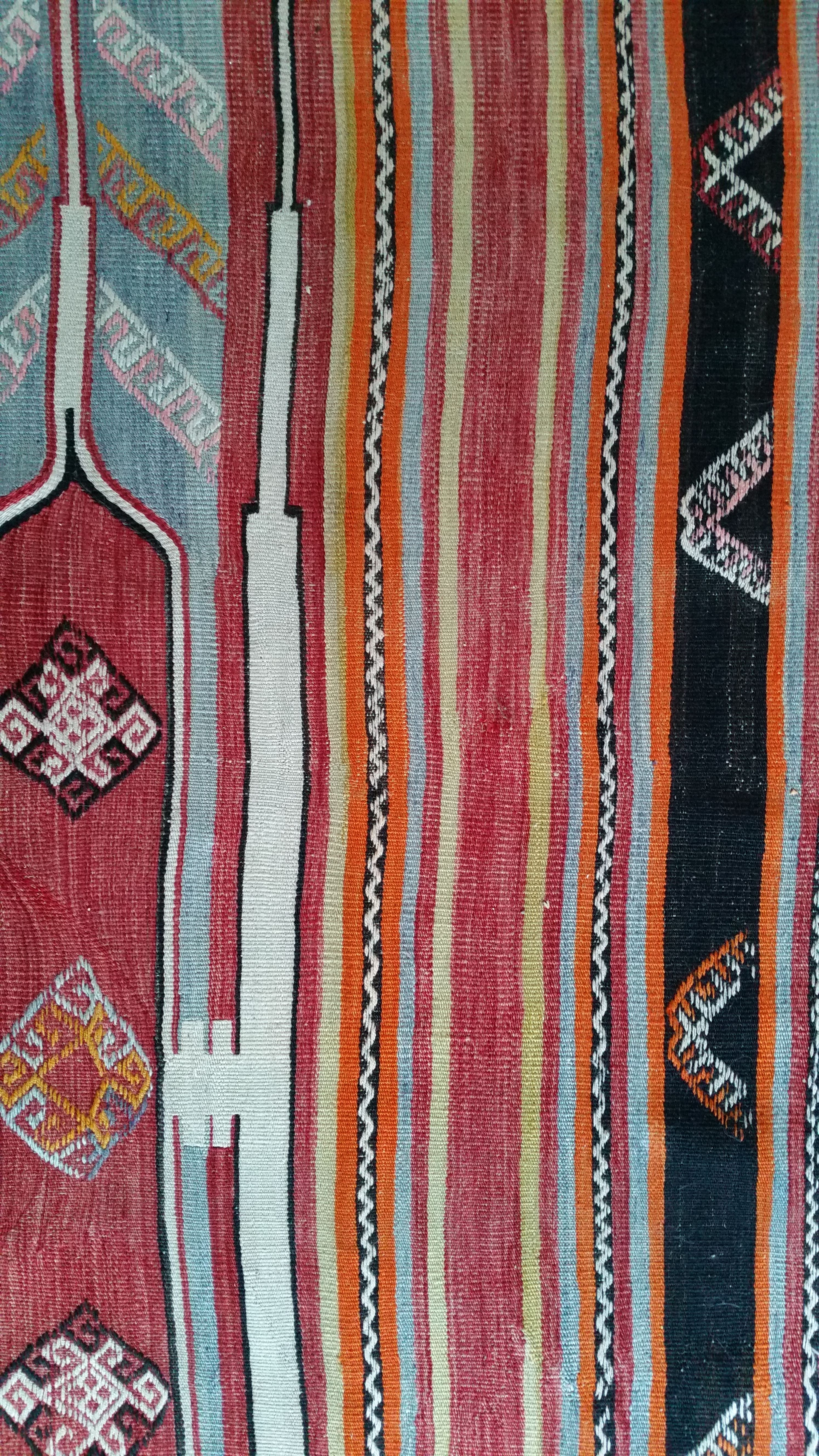 Détail d'un kilim turc - anatolie centrale. Vers 1930.